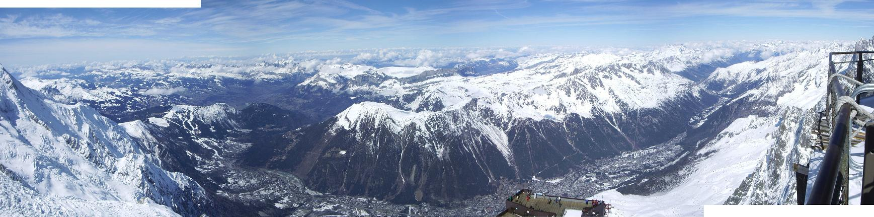 Blick von der Aiguille Midi gegen Westen: Chamonix-Tal und Aiguilles Rouges. In der Bildmitte direkt oberhalb vom Stadtgebiet von Chamonix ist der Brévent zu sehen, auf den von Chamonix über Planpraz eine Seilbahn führt.